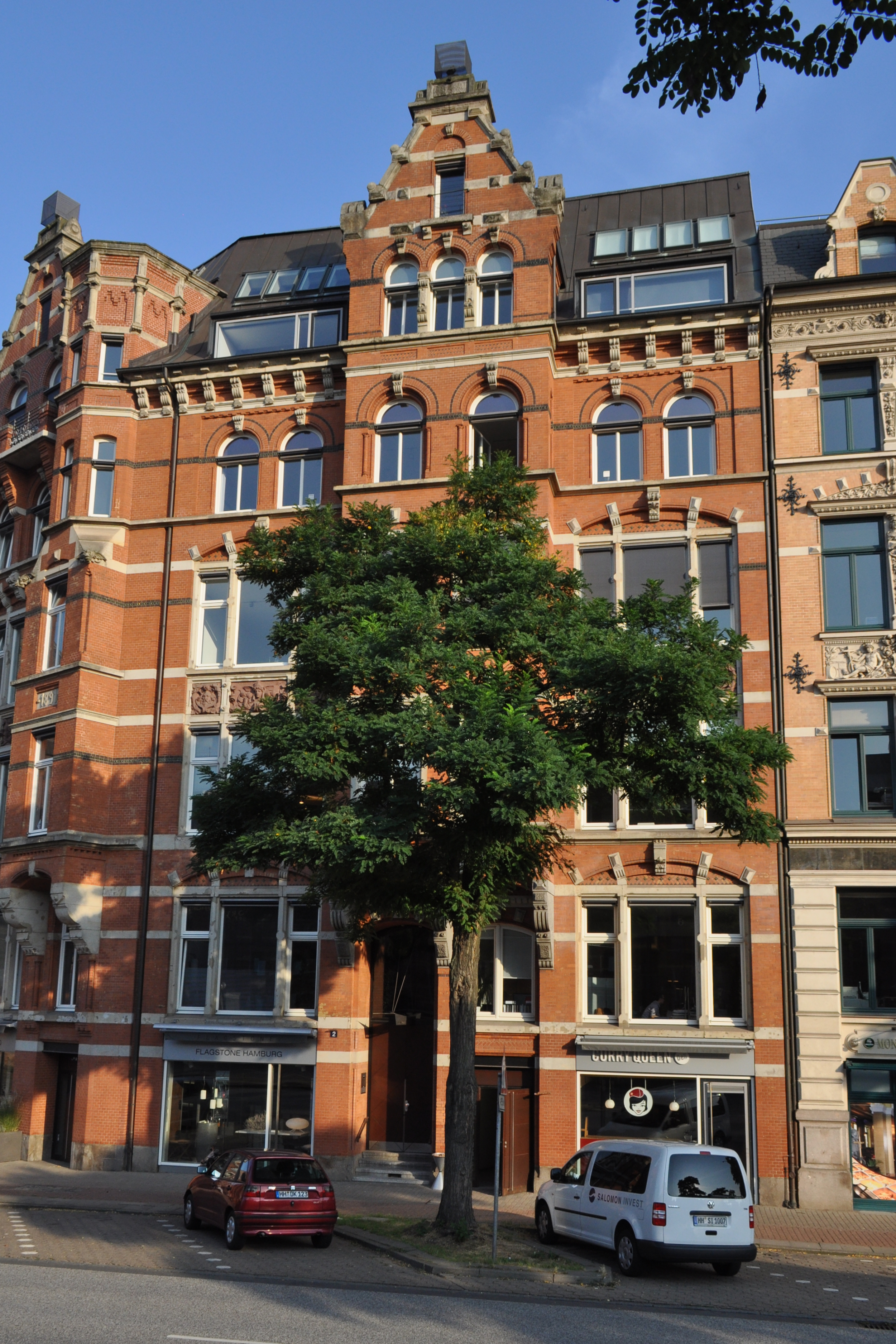 Wohngeschäftshaus Zippelhaus 2 in Hamburg-Altstadt (Frachtenhaus). This is a photograph of an architectural monument.